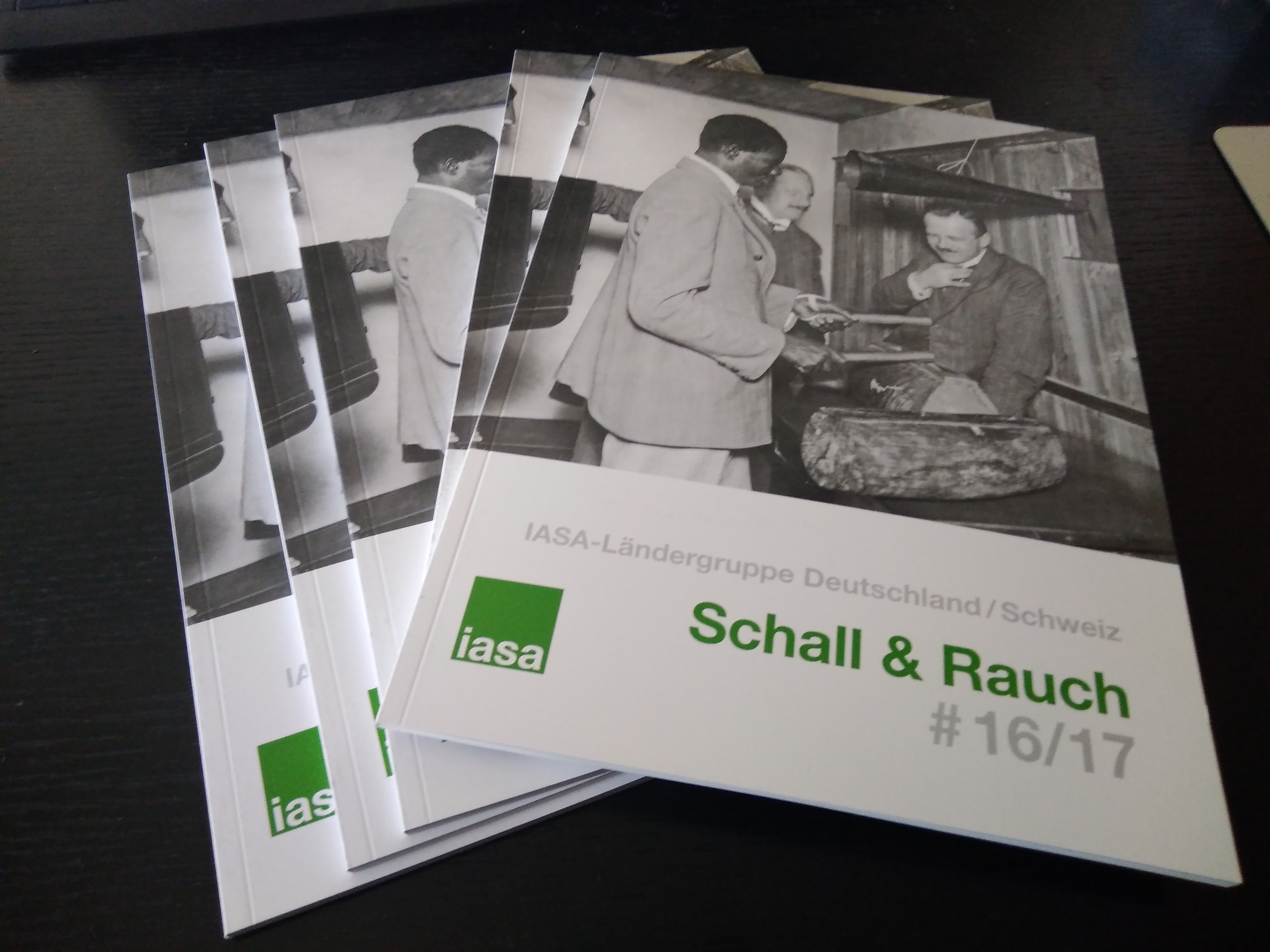 IASA Deutschland/Schweiz: Ausgabe Schall&Rauch 15/16